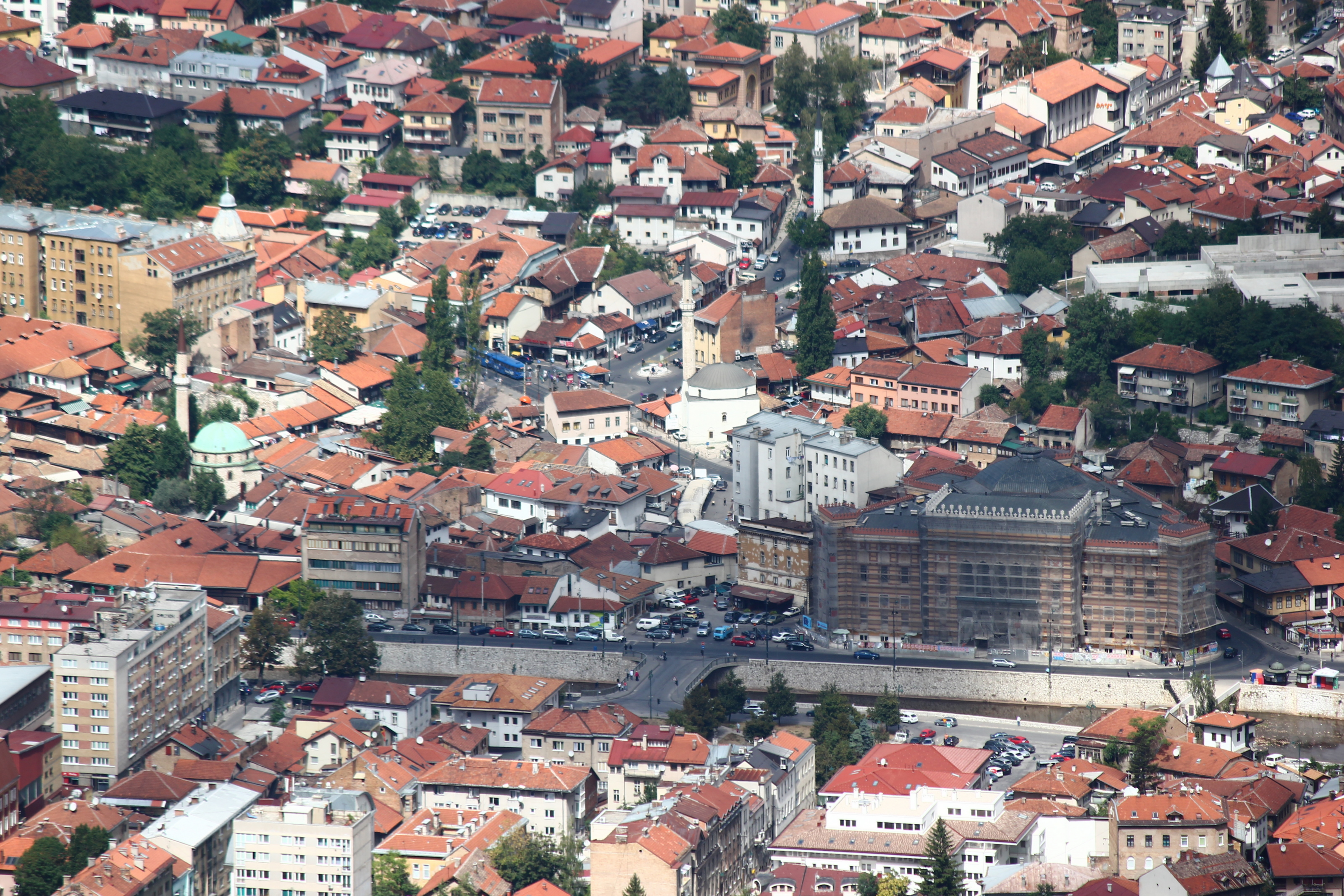 Die Baščaršija (osmanische Altstadt) von Sarajevo vom Berg Trebević aus gesehen. Während der Belagerung von Sarajevo wurde der Berg von Heckenschützen und Artillerie der Armee der bosnischen Serben als Stellung genutzt.